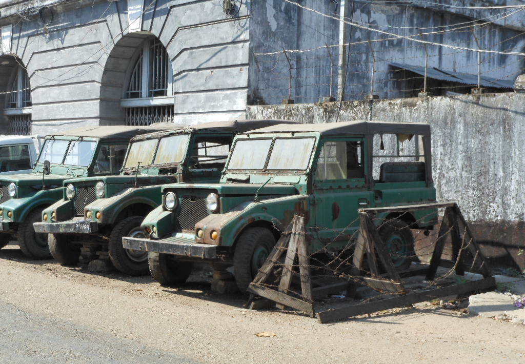 Idle Jeeps